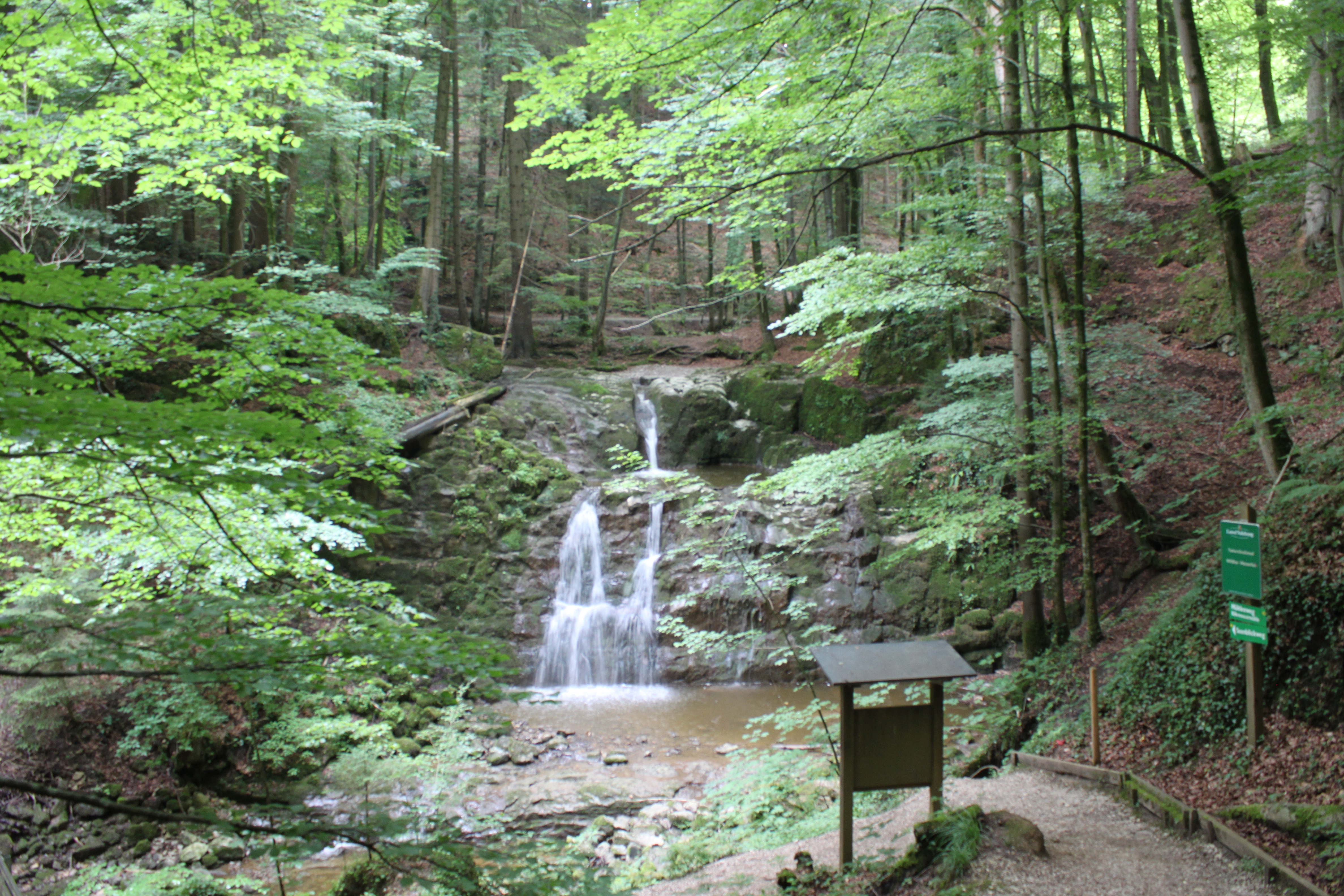 Wildkarwasserfall, Teufelsgrabenbach, Teufelsgraben, Ortschaft Matzing, Gemeinde Seeham. Wenig Wasser bzw. Niedrigwasser, links oben ist die Ausleitung in einem Baumstamm zur Kugelmühle erkennbar